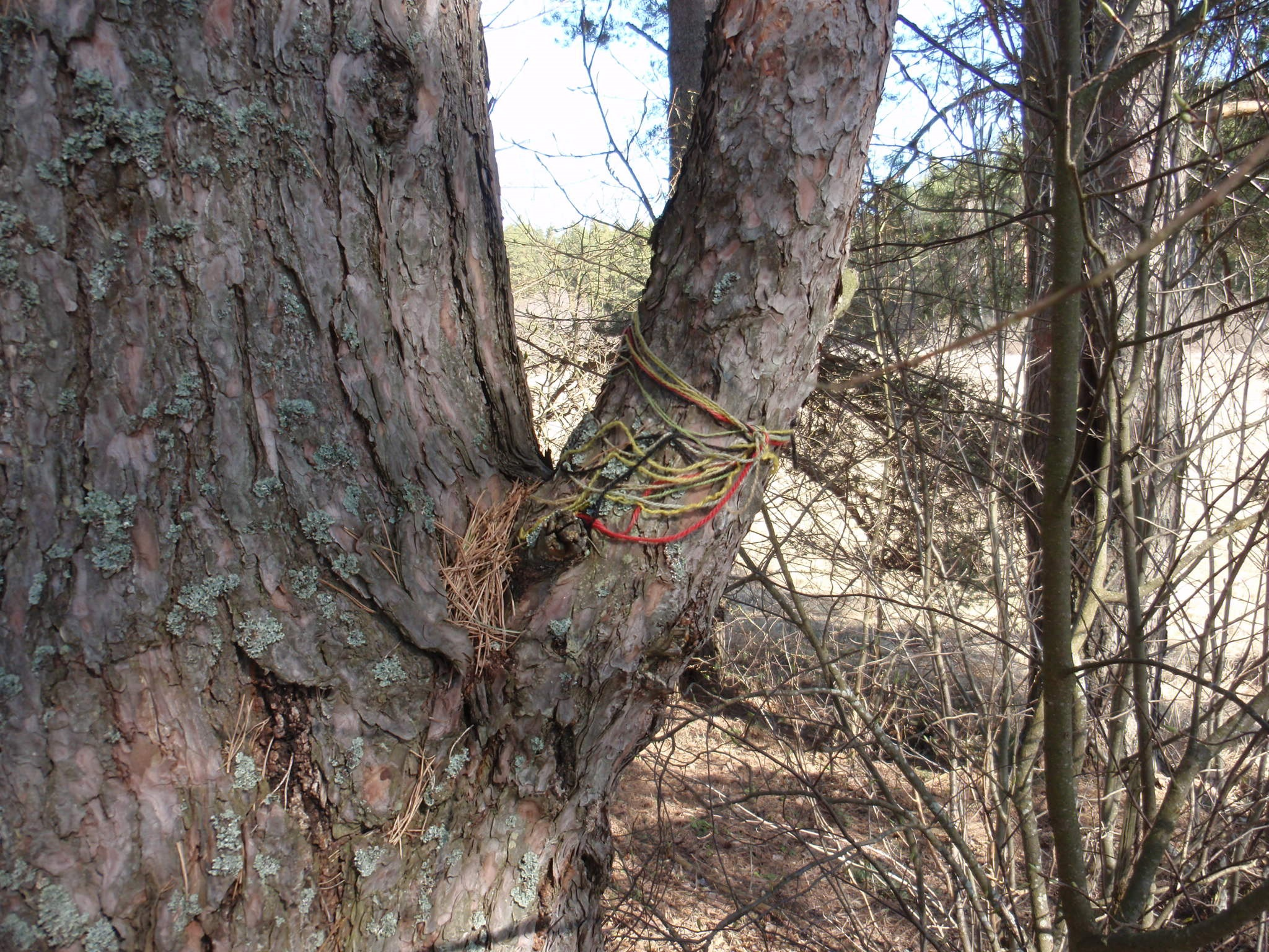 Maausuliste lõngad Eoste Ristimäe männil